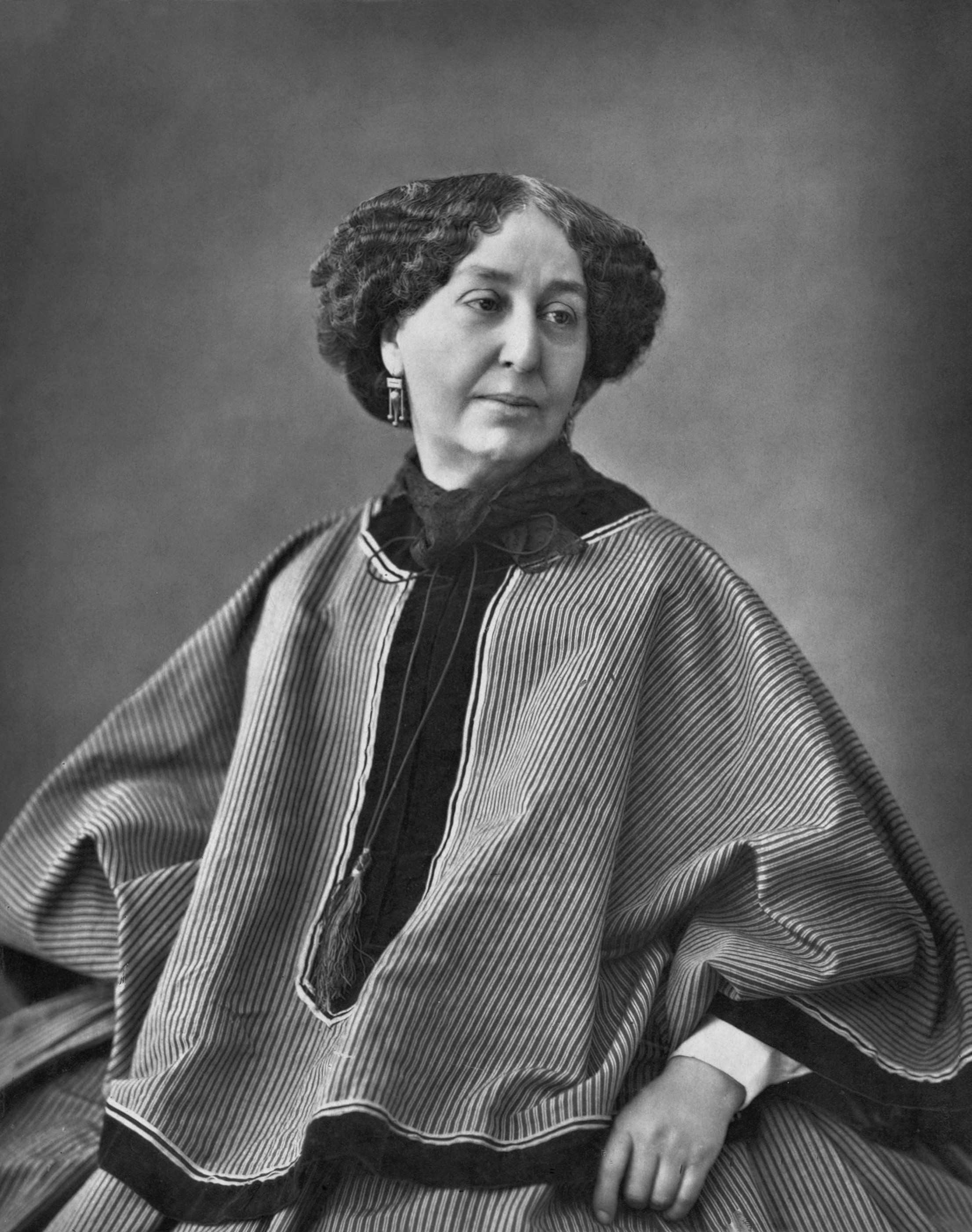 George Sand (1804–1876) Alternative names Amantine Aurore Lucile DupinDescriptionFrench writer, journalist, salonnière, playwright, novelist and composerDate of birth/death 1 July 1804 8 June 1876 Location of birth/death Paris Nohant-VicAuthority control : Q3816 VIAF: 46766944 ISNI: 0000 0001 2130 9531 ULAN: 500054039 LCCN: n78081235 NLA: 35474179 WorldCat creator QS:P170,Q3816 La romancière George Sand est photographiée par Nadar qui réalise une série de clichés de l'écrivain, au mois de mars 1864.